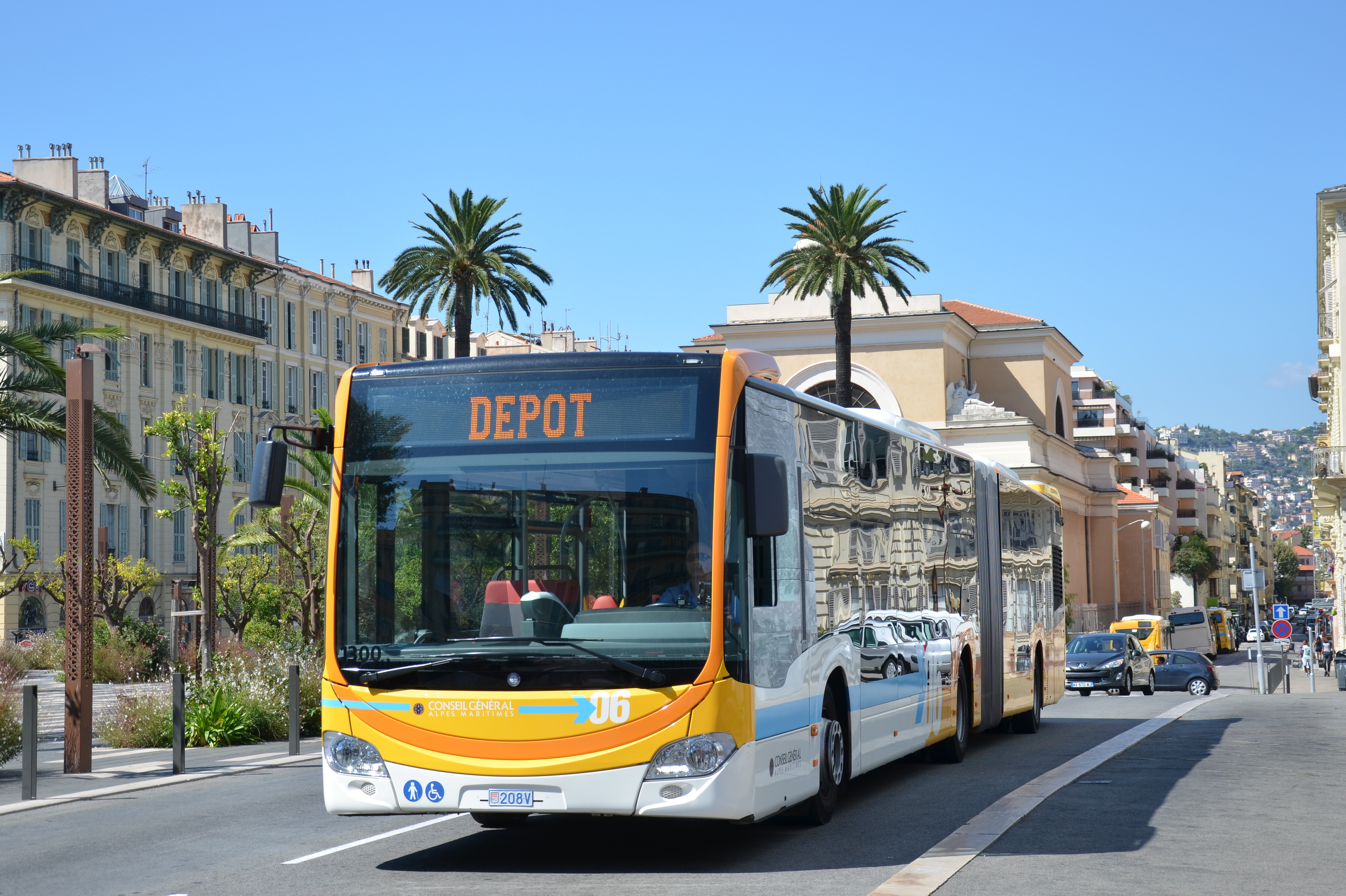 Mercedes Citaro G C2 n°1300 près du pôle multimodal Promenade des Arts à Nice. Cet autobus articulé circule sur la ligne 100 entre Nice et Menton via Monaco.